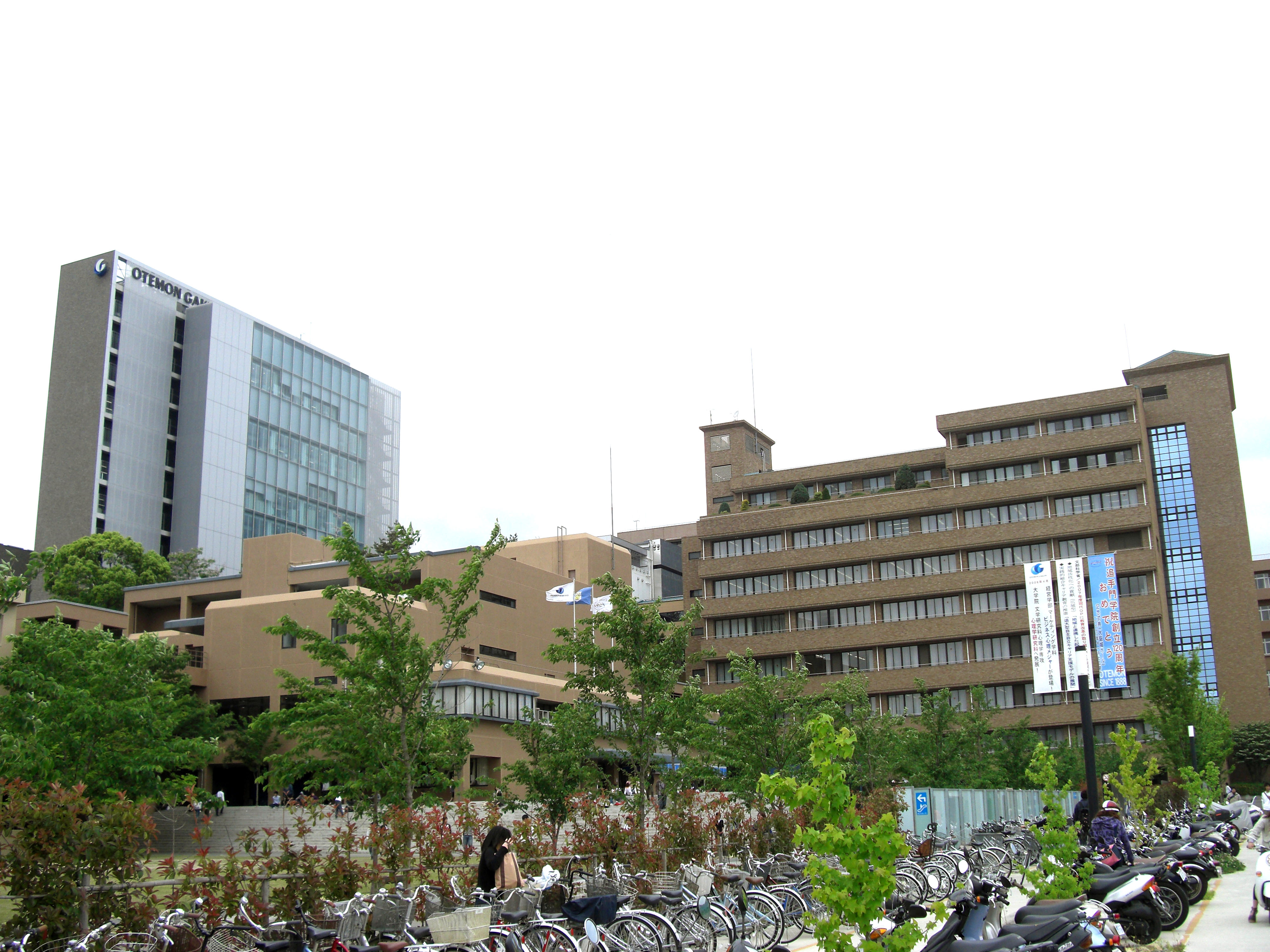 Otemon Gakuin University,Nishiai Ibaraki-City Osaka Japan.